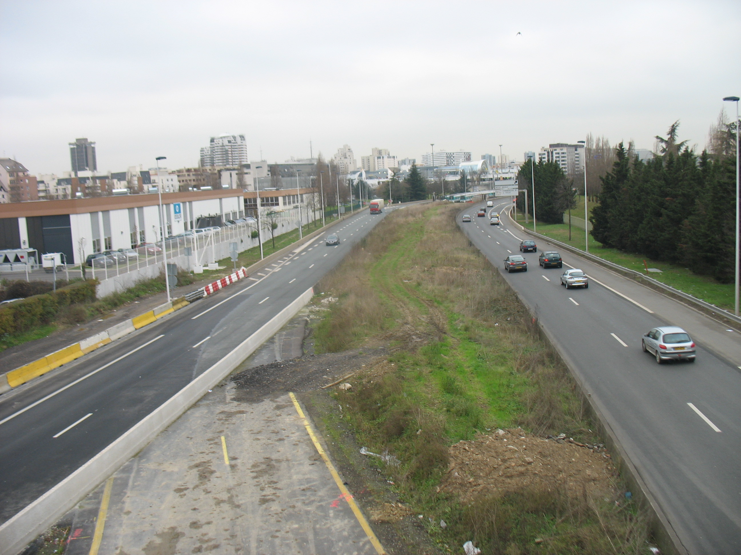 Au fond, l'arrière gare de la station Créteil-Préfecture, la ligne va passer au milieu des voies avant de rejoindre le saut de mouton.